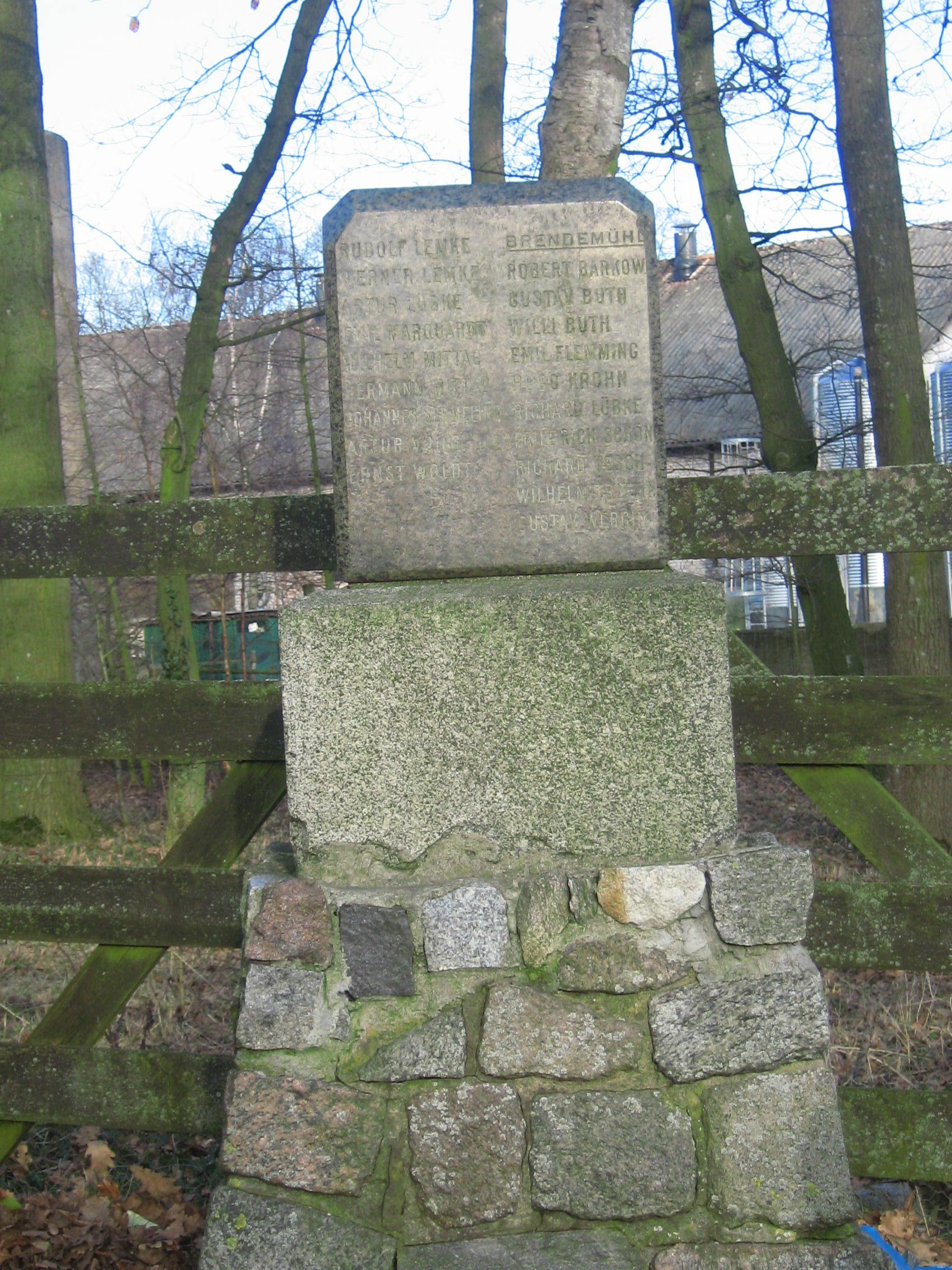 Pomnik żołnierzy z okolicznych miejscowości którzy zginęli podczas I wojny światowej. Stoi Trzebieszewie koło kościoła.